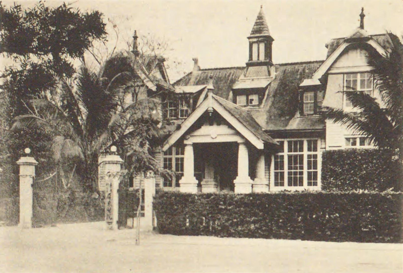 臺灣總督府屏東醫院，已拆除